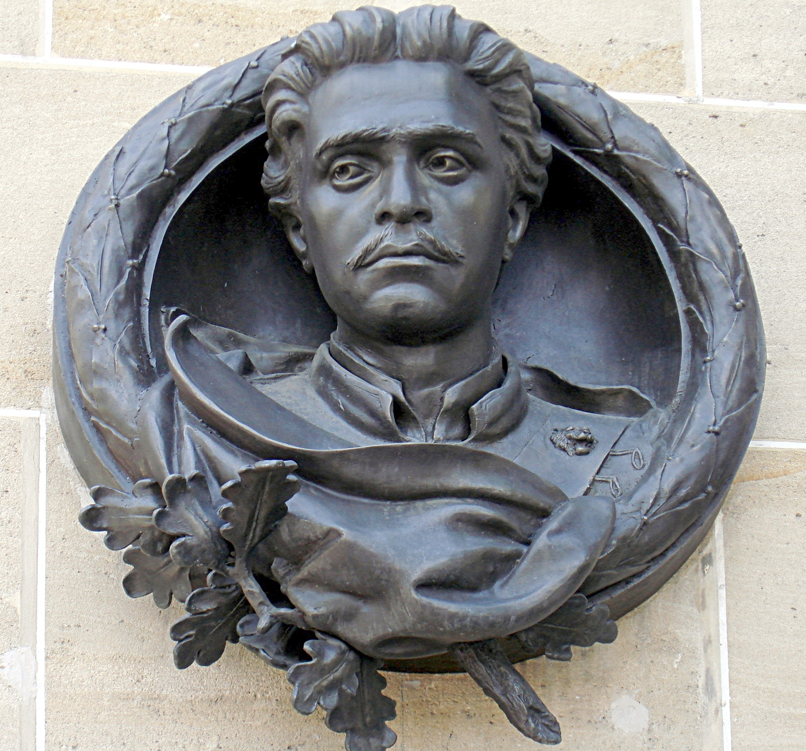 Efigia lui Vasil Levski pe peretele ambasadei Bulgariei la Paris